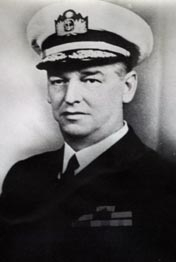 Vicealmirante Roque A. Saldías